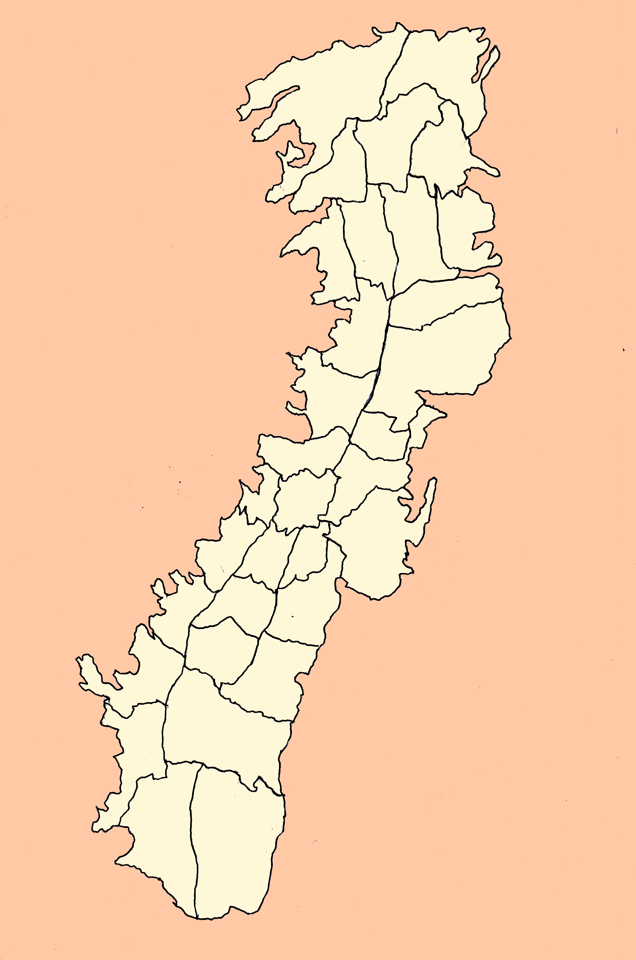 Parroquias urbanas de la ciudad de Quito, Ecuador